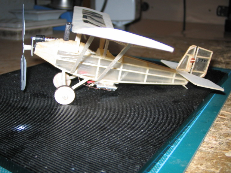 Pietenpol Air Camper d'après un plan de Bob Peck, il est à l'échelle pistachio c'est à dire que son enverggure est de 8" (20cm), son poids est de 4g .